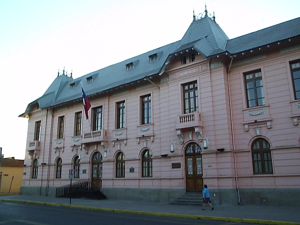 Edificio de la Gobernación Provincial de Colchagua Autor:Alstradiaan Fecha:Febrero de 2005 Fotografía tomada con una cámara digital Olympus camedia D-395 de 3.2 megapixeles